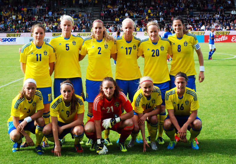 a_34_0025